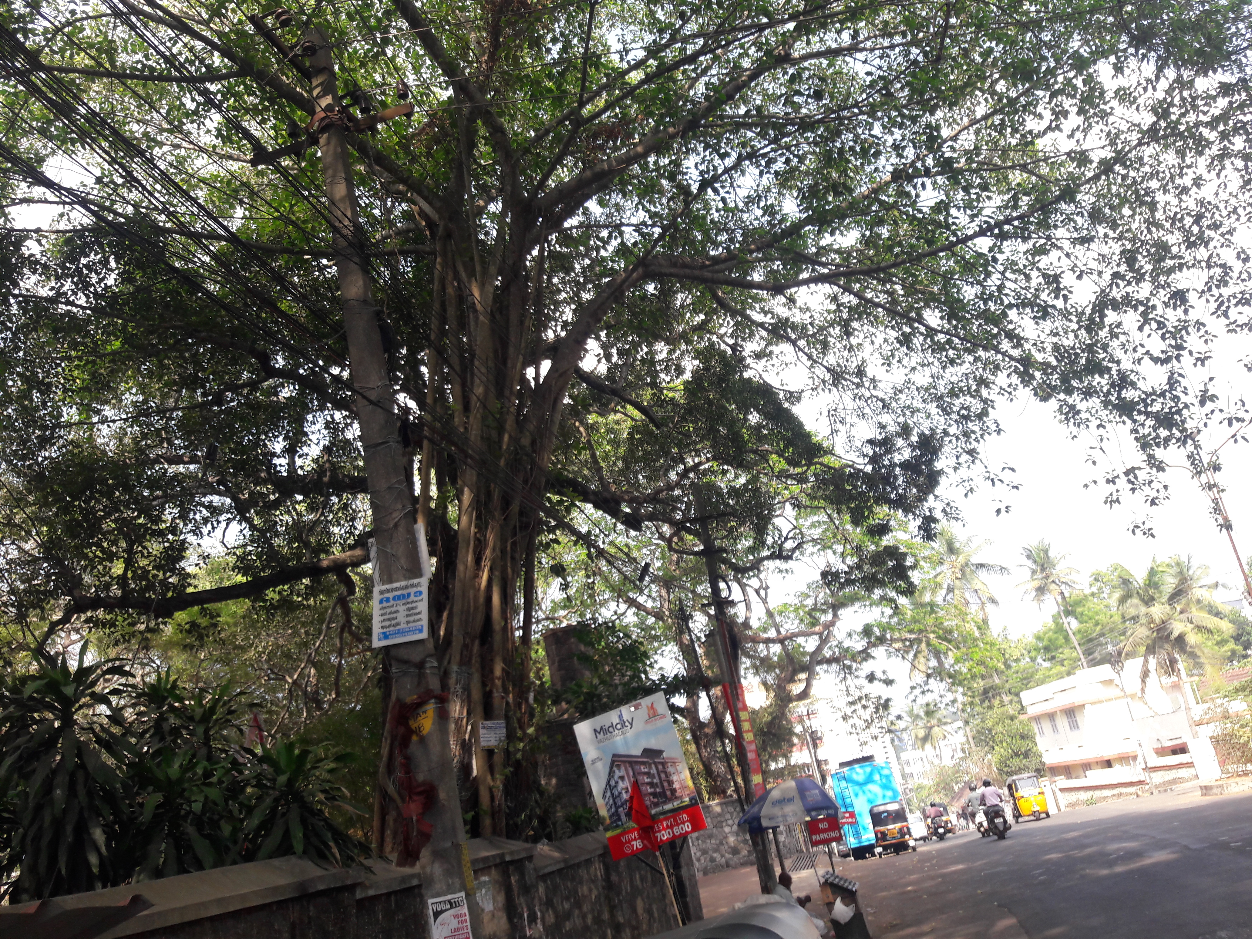 സ്വാതിതിരുനാൾ സംഗീത അക്കാദമിയുടെ മതില്‍ ചേര്‍ന്ന് വളരുന്ന മനോഹരമായ ഒരു പേരാല്‍ മരം,Banyan tree ശാസ്ത്രീയ നാമം Ficus benghalensis കുടുംബം Moraceae.